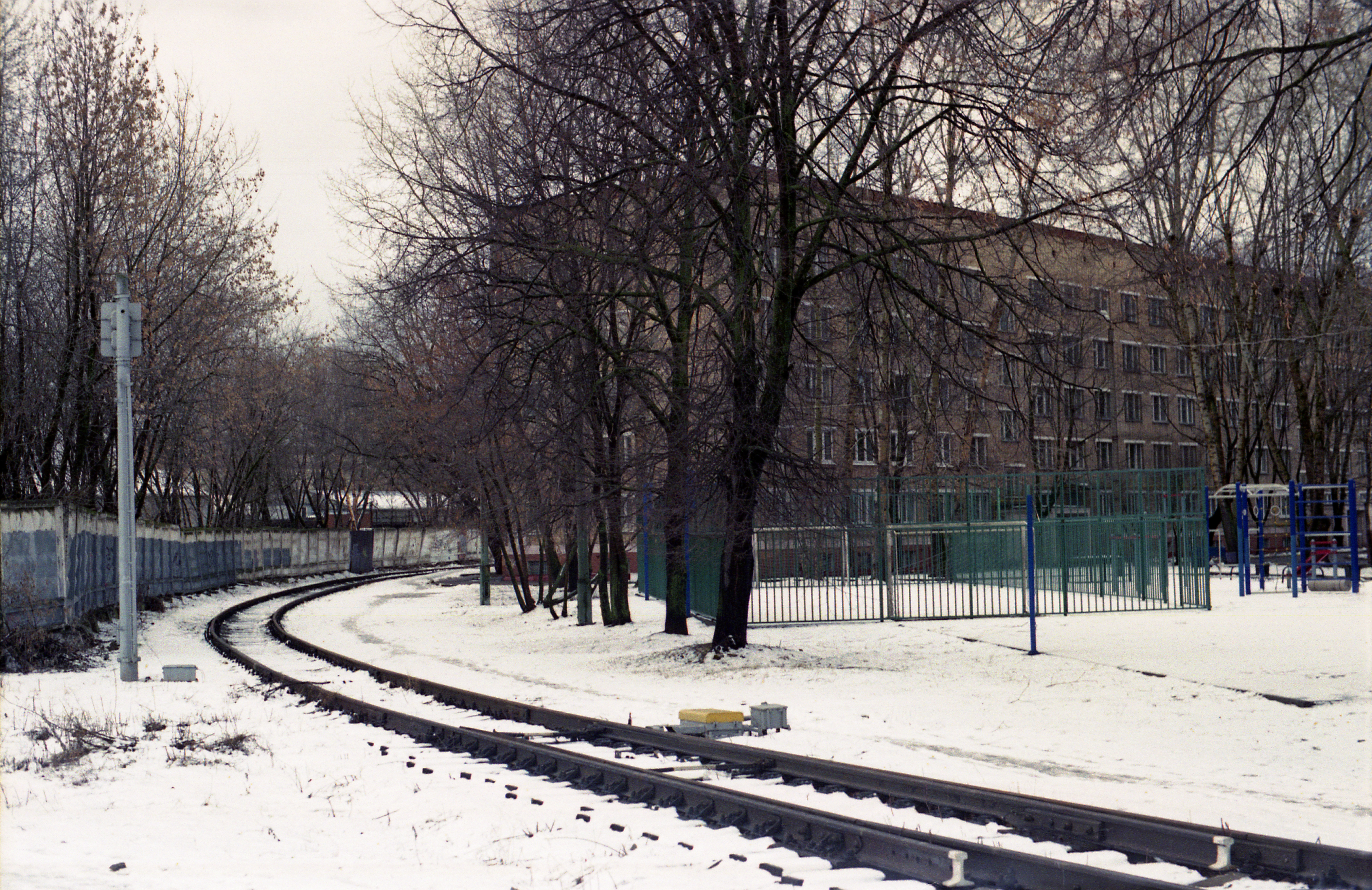 Станция Старополетарская, Москва RZD Startproletarskaya station 2020-02 Moscow. Ricoh KR-10X camera, Fujifilm Fujicolor400